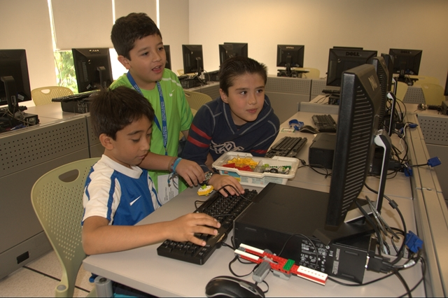 Niños en taller de verano sobre robótica en el ITESM Campus Ciudad de México